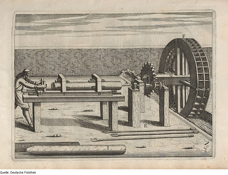 Original image description from the Deutsche FotothekMechanik & Mühle & Bohrmühle & Wassermühle & Wasserrad